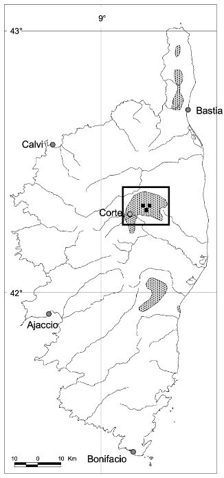 zonage de la santoline